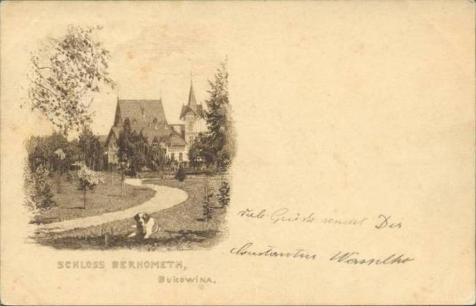 Schloss Berhometh, Bukowina. „Viele Grüße sendet Dir Constantin Wassilko.“